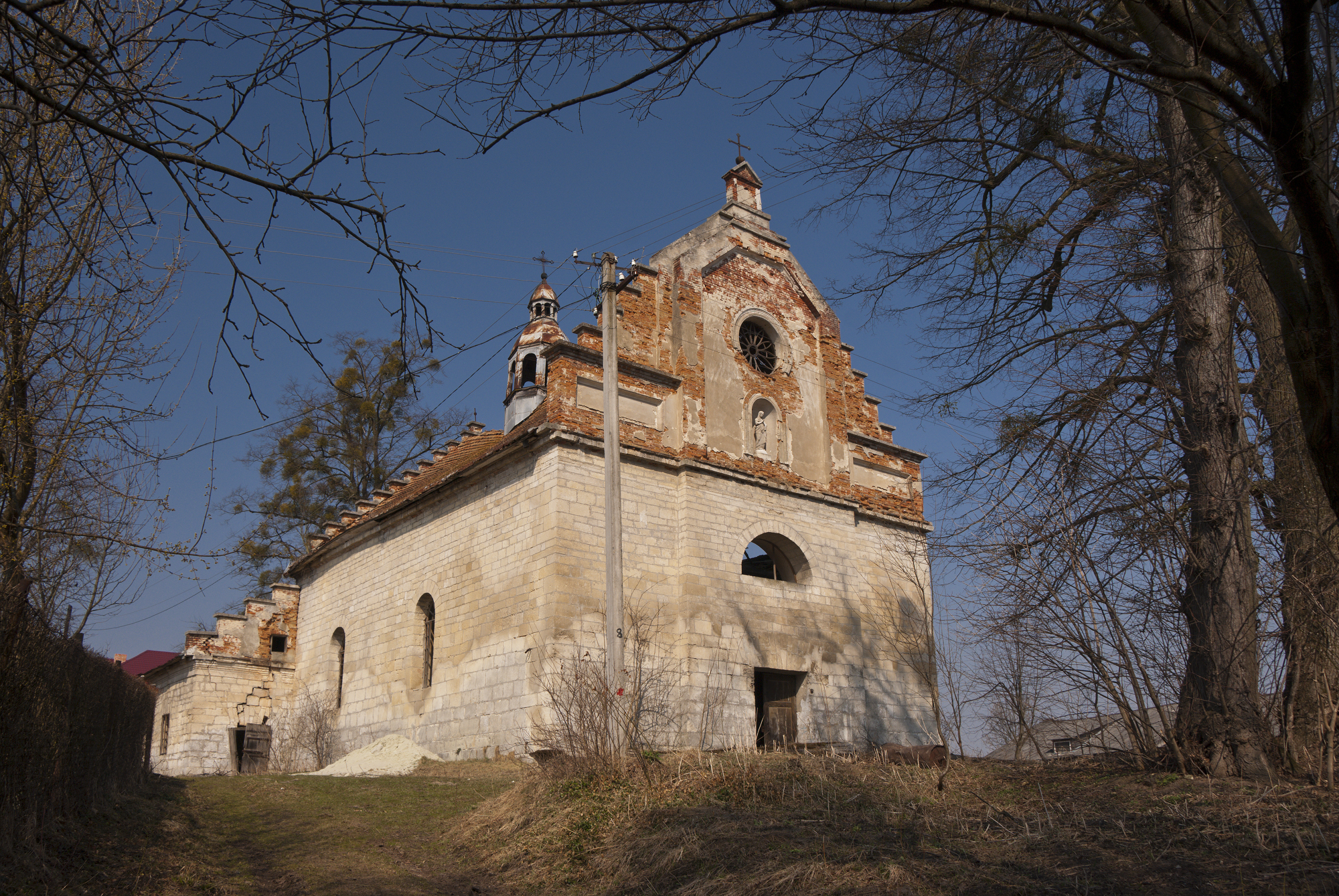 Костел Св. Валентина (1856 р.) в селі Раковець